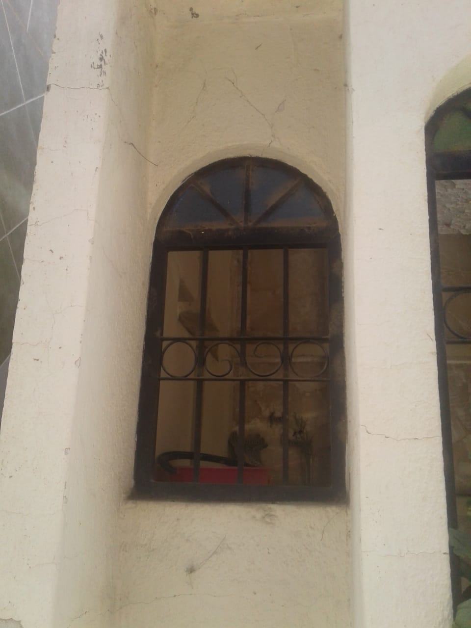 estilo noeclasico